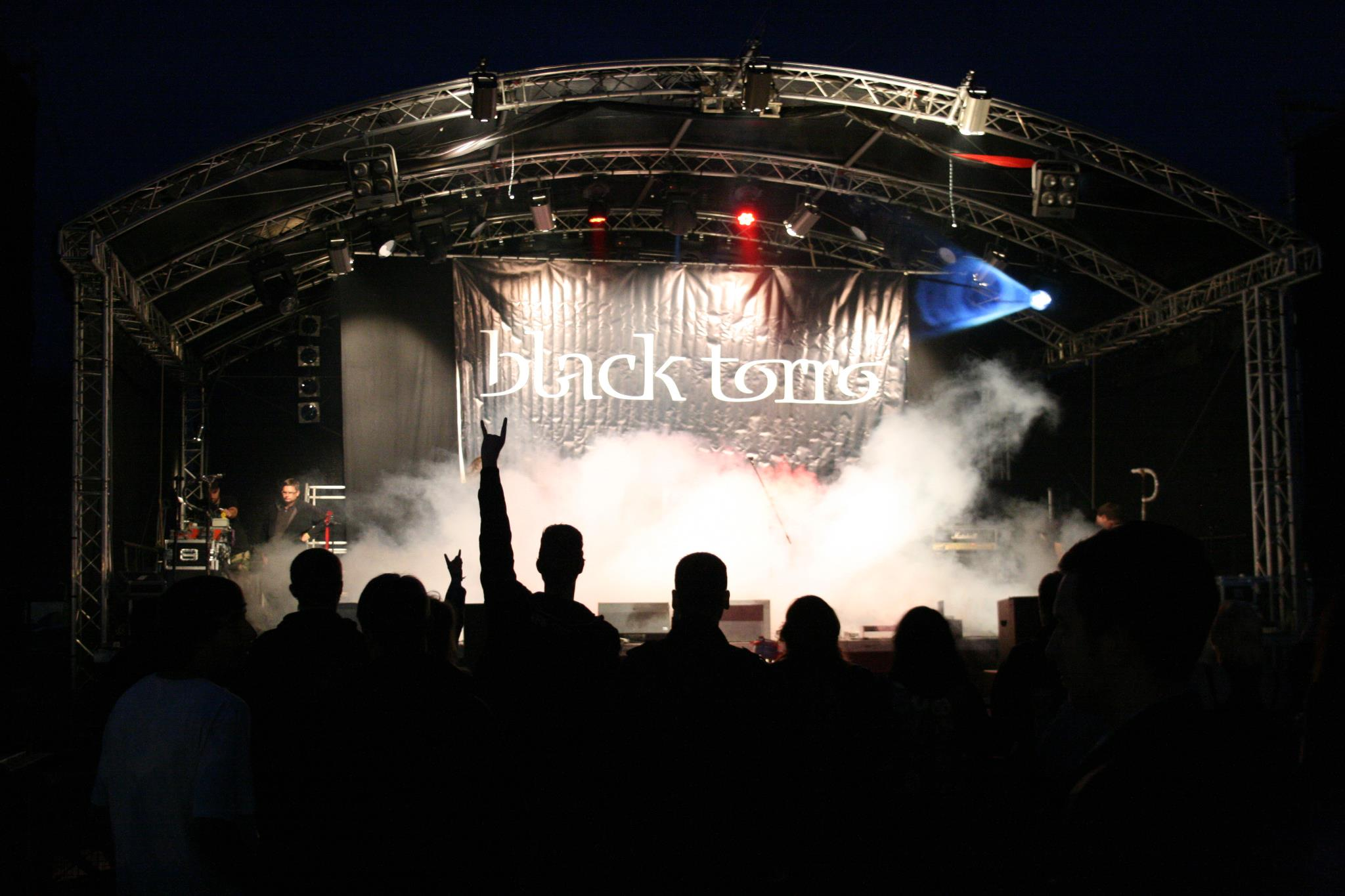 black torro live beim Vinstedt Open Air 2011